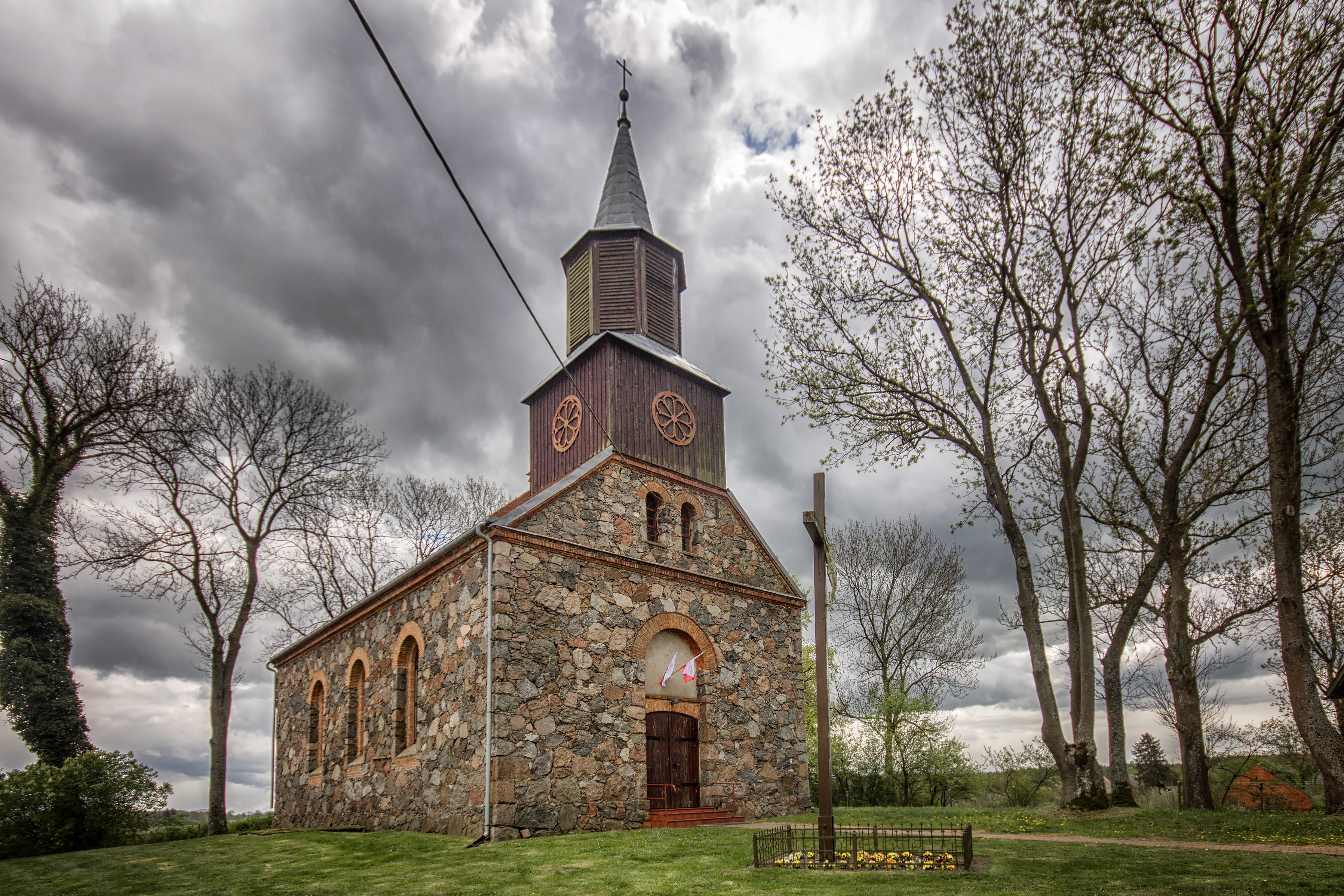 Ościęcin, kościół ewangelicki, ob. rzym.-kat. fil. p.w. św. Stanisława Kostki, 1842